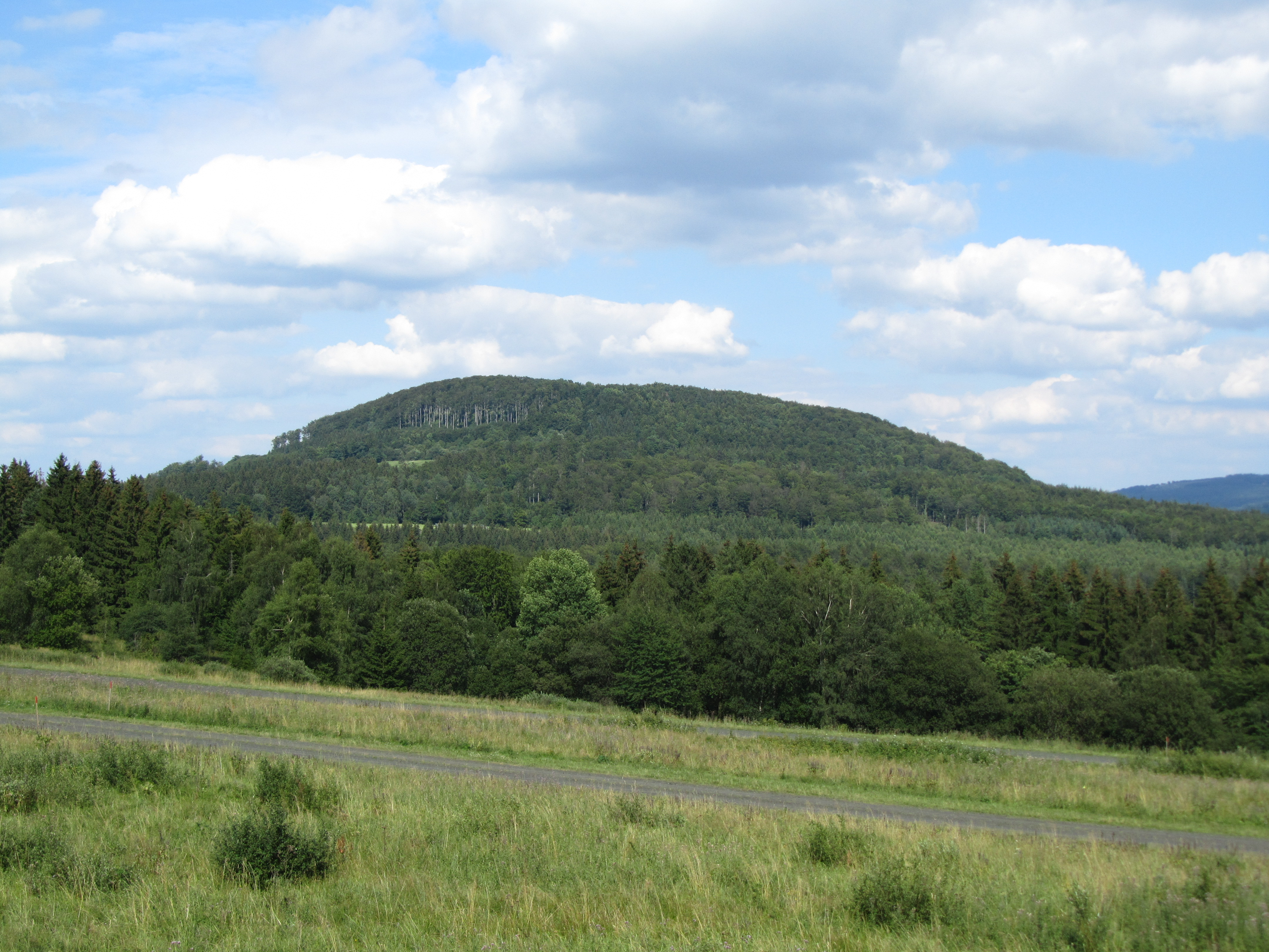 Der Große Auersberg (809 m) in der Rhön von Südwesten.